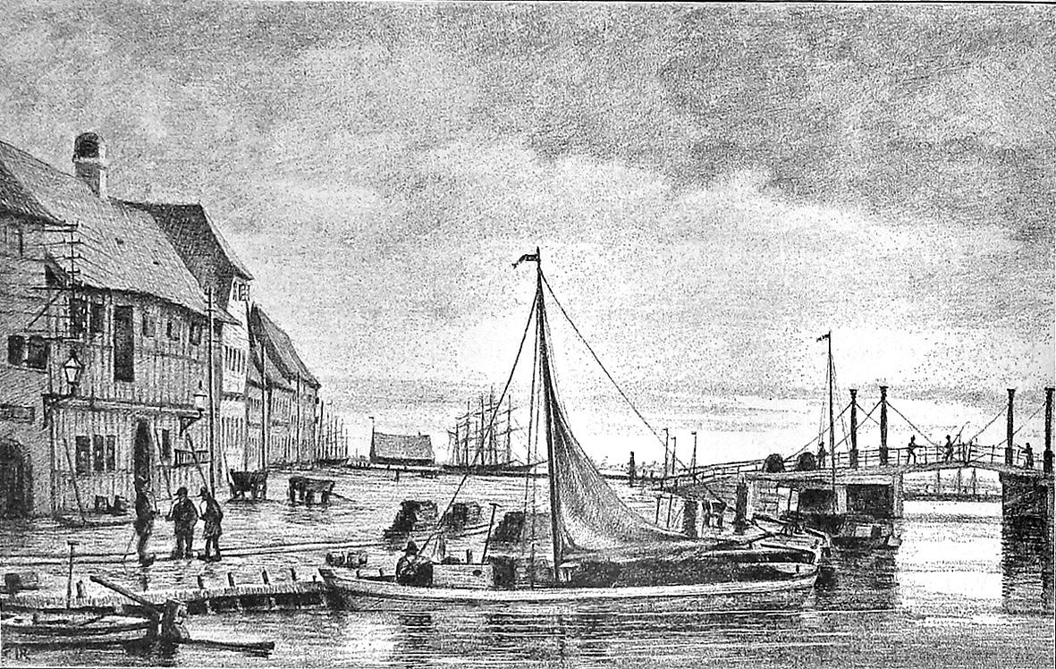 Tørvebryggen i Randers i slutningen af 1800-tallet